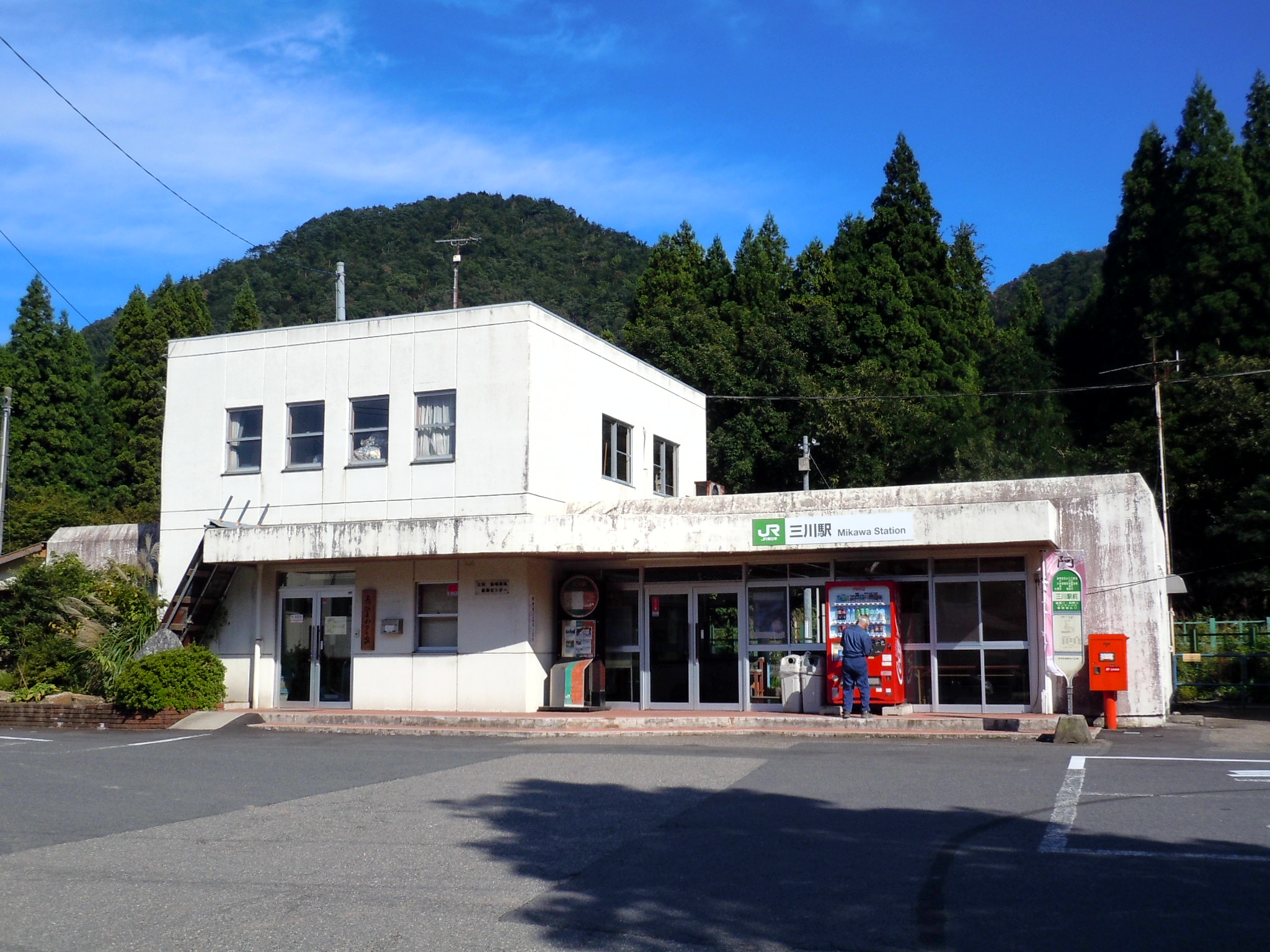 JR東日本磐越西線 三川駅